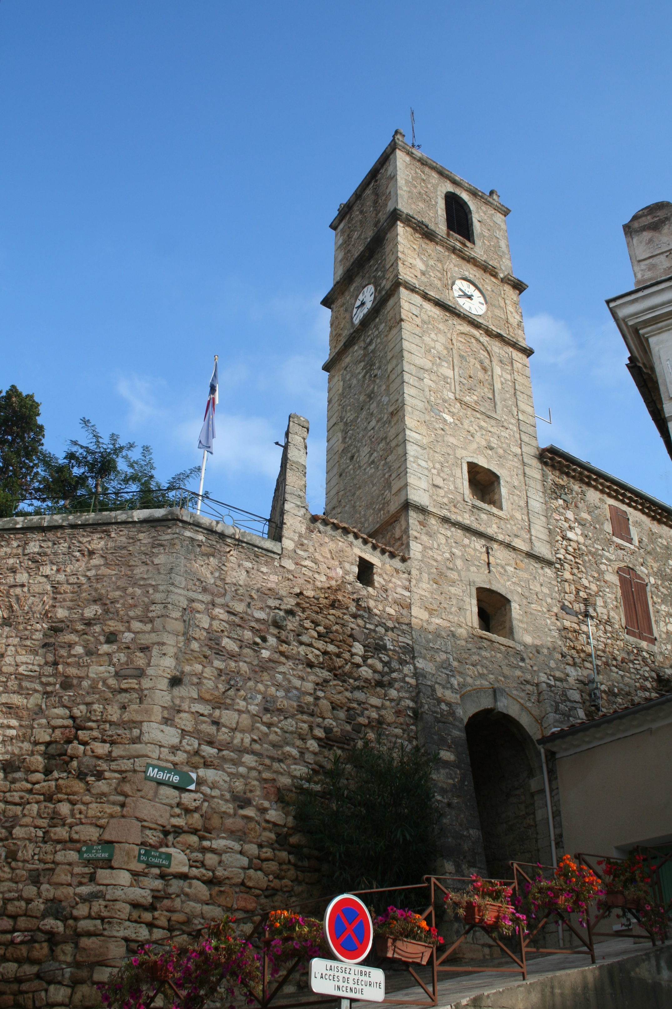 Laurens (Hérault) - rue du château.